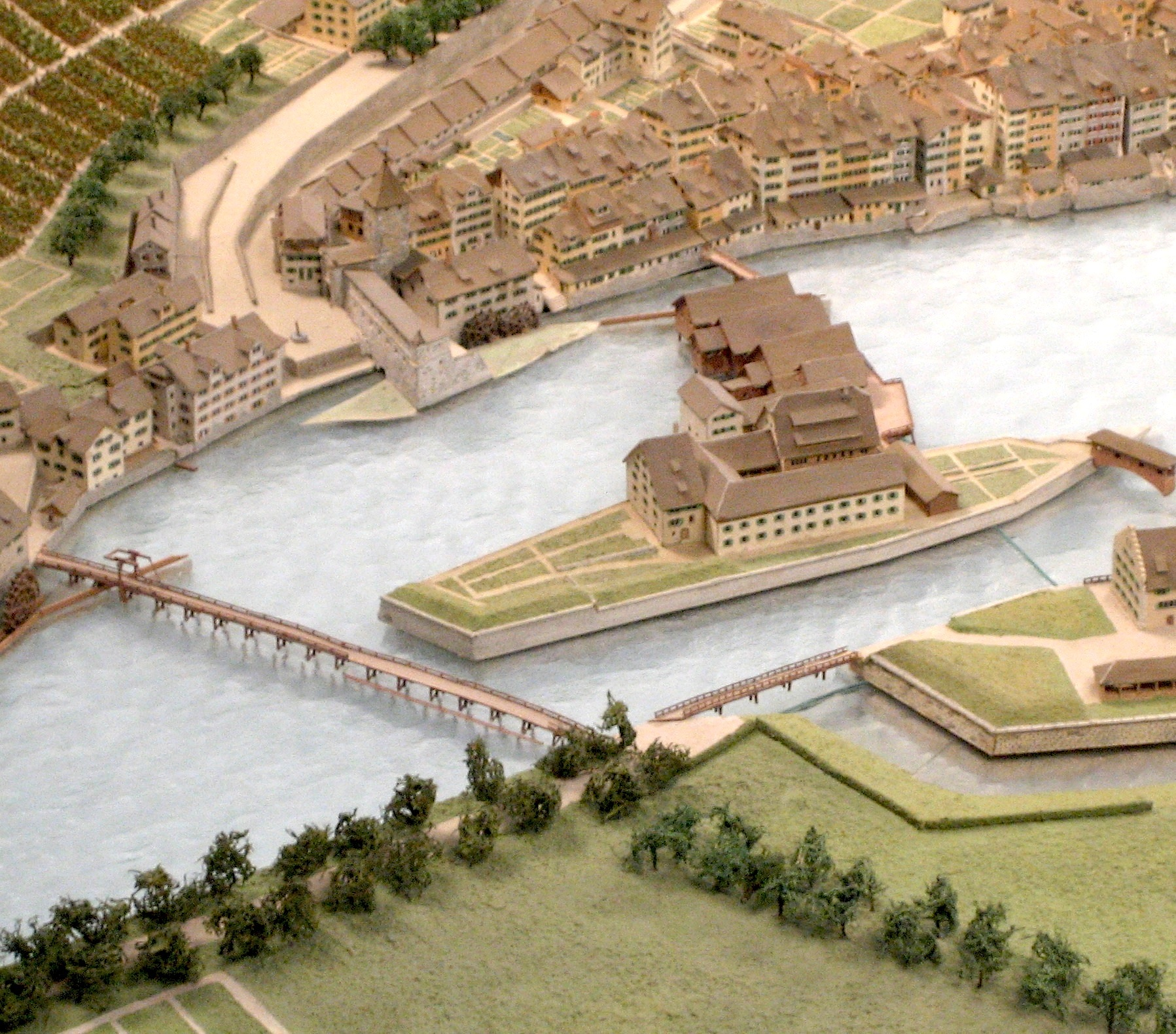 Die Papierwerdinsel auf dem Stadtmodell Zürichs von Hans Langmack, ausgestellt im Haus zum Rech am Neumarkt 4 in Zürich